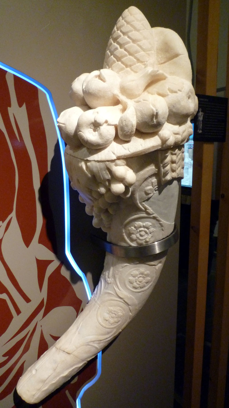 Cornucopia romana procedente de la palestra de las excavaciones del Molinete en Cartagena (España). Museo arqueológico municipal de Cartagena